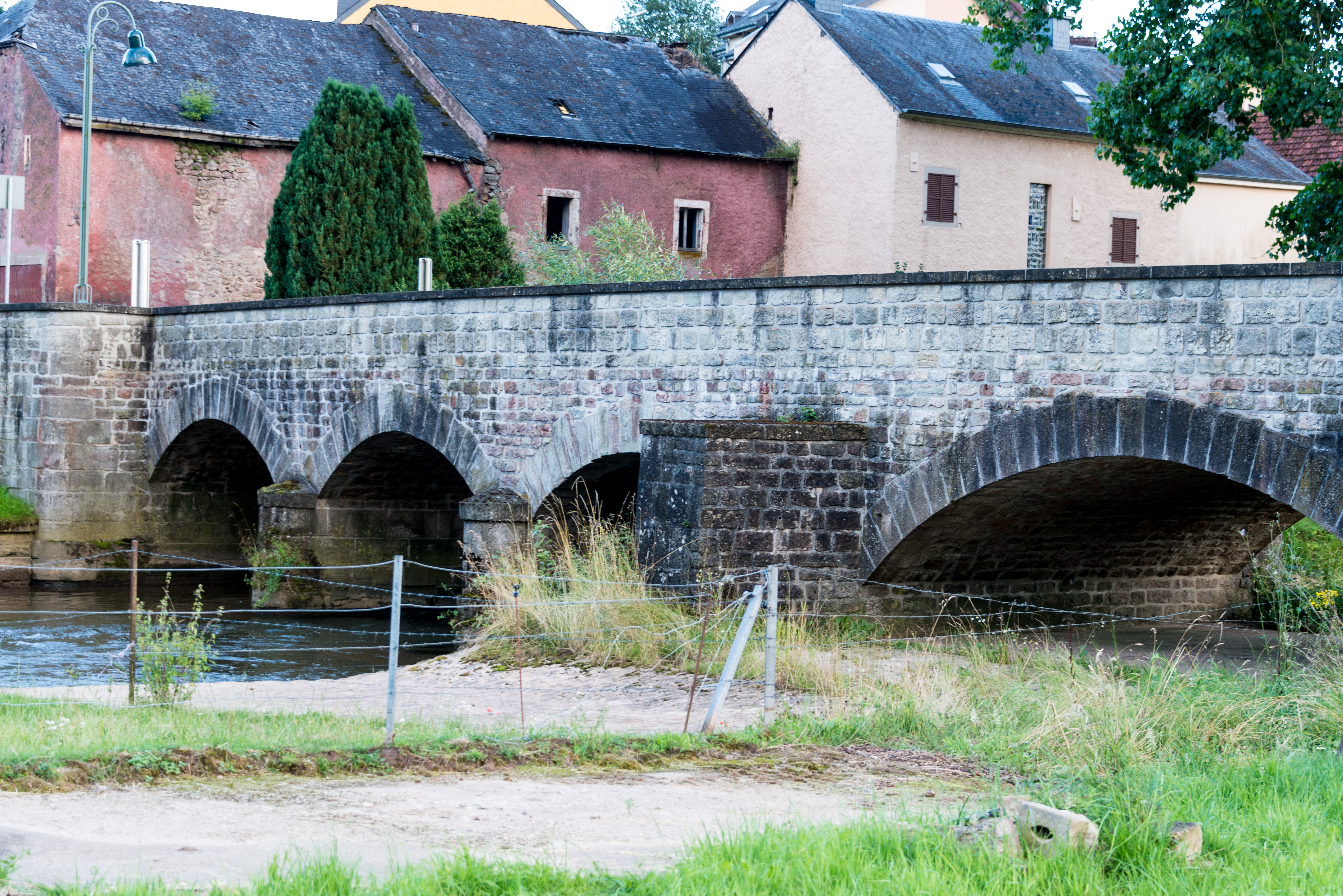 D'Atert-Bréck (CR112) zu Béiwen.